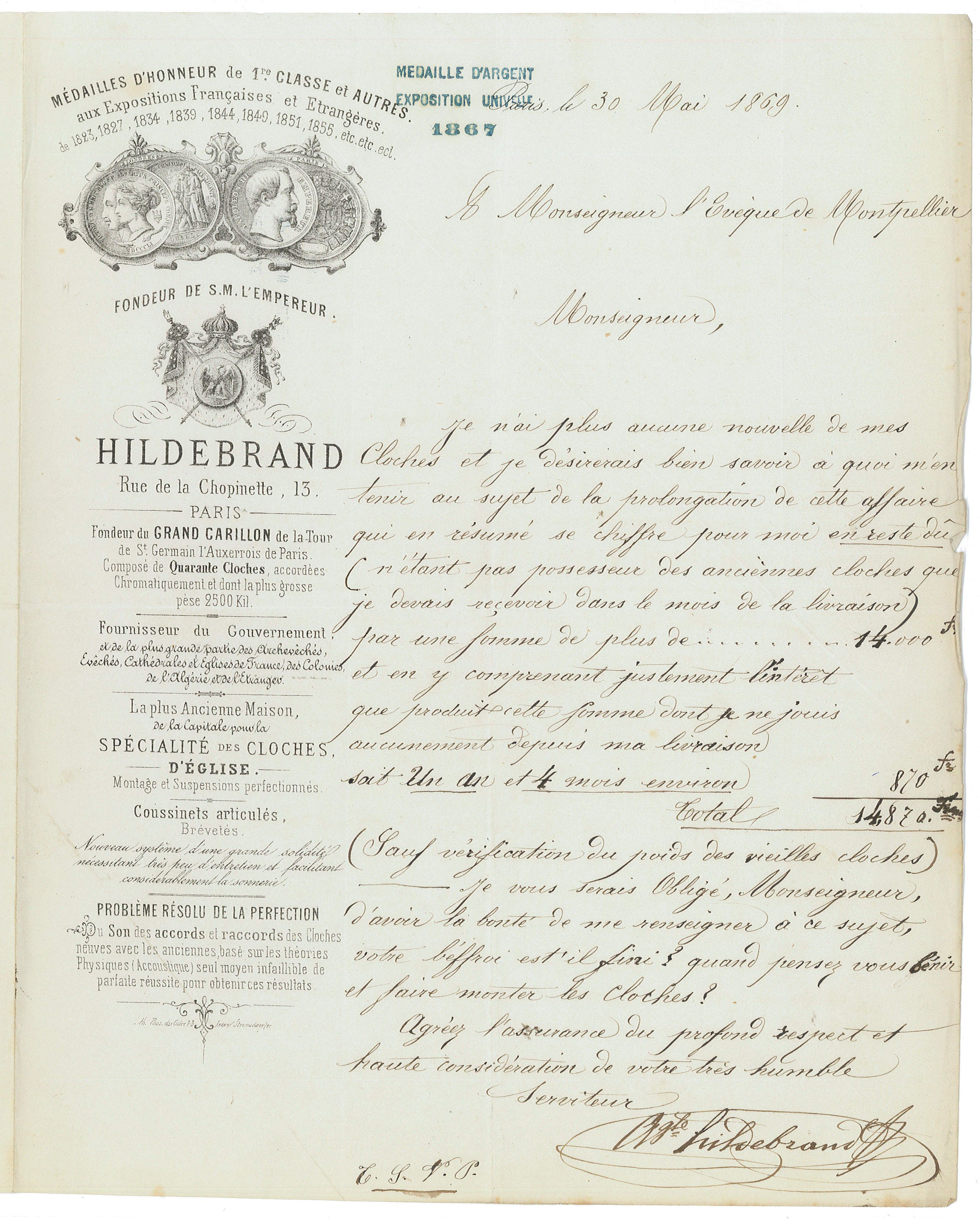 Archives nationales, cote F/19/7761